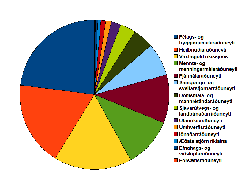 Fjárlög íslenska ríkisins 2010